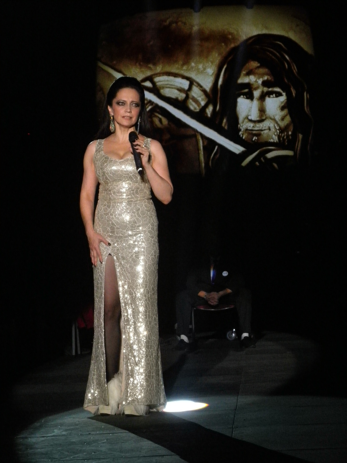 Lucie Bílá se nebála jít i do davu. Černobílé turné 2014 Ostrava - 19.10.2014